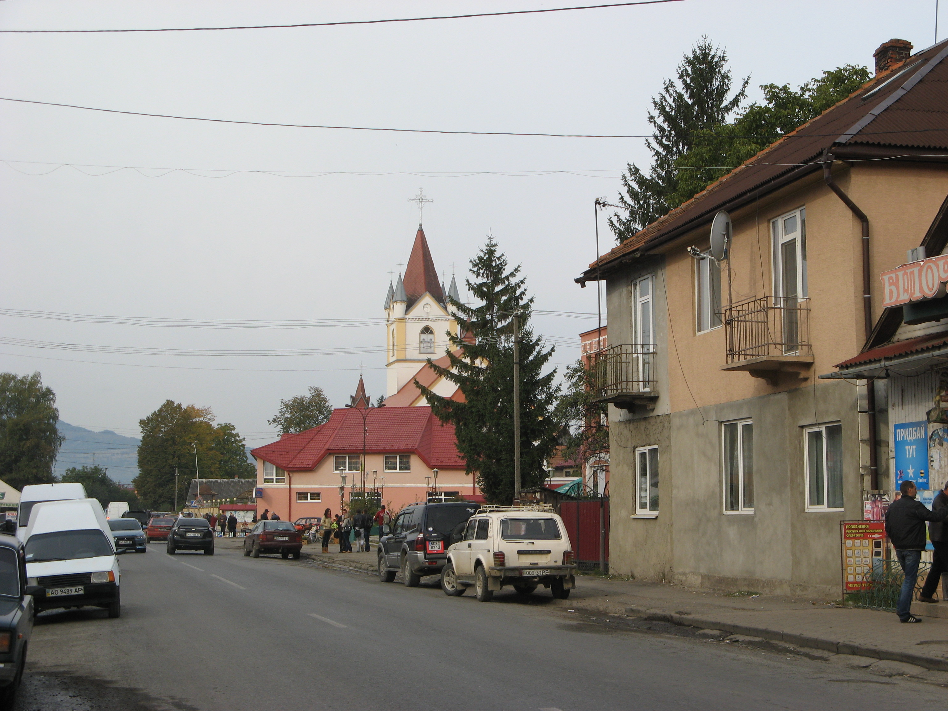 смт Тересва (Тячівський р-н, Закарпатська обл.)